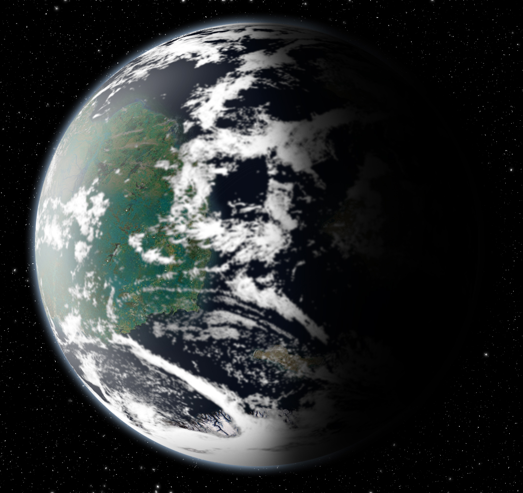 Impresión artística de un planeta análogo a la Tierra perteneciente a una estrella de tipo F.